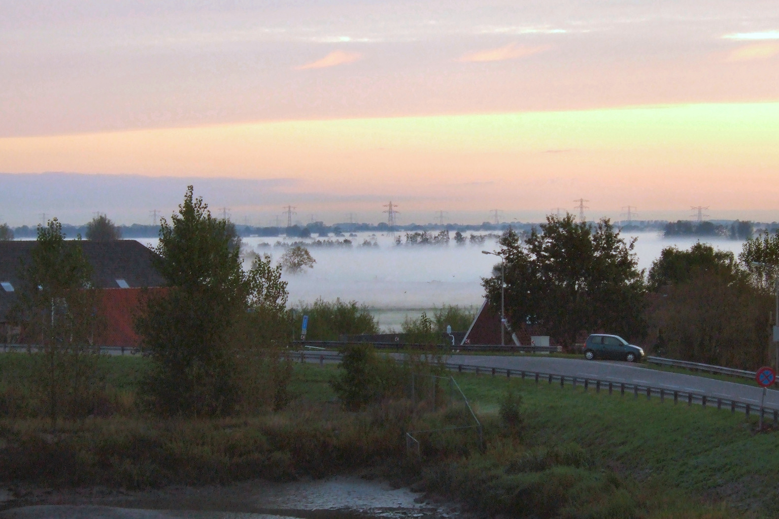 Krimpenerwaard op een frisse oktobermorgen